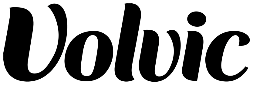 Logo von Volvic